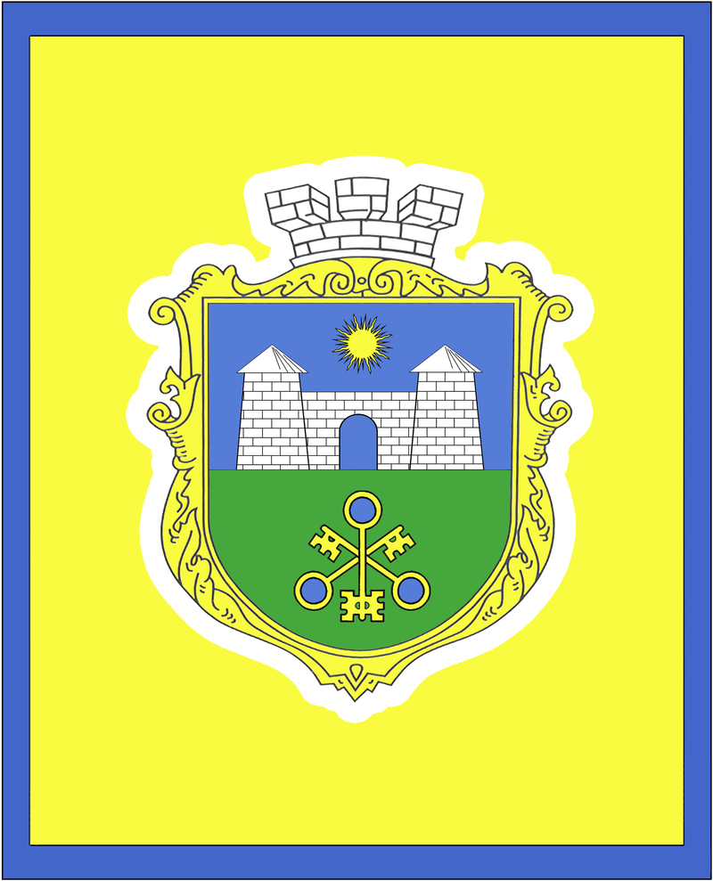 Прапор міста Татарбунари